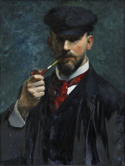 Robert Thegerstrom, Autoportrait avec une pipe, HST, 73 x 57 cm.